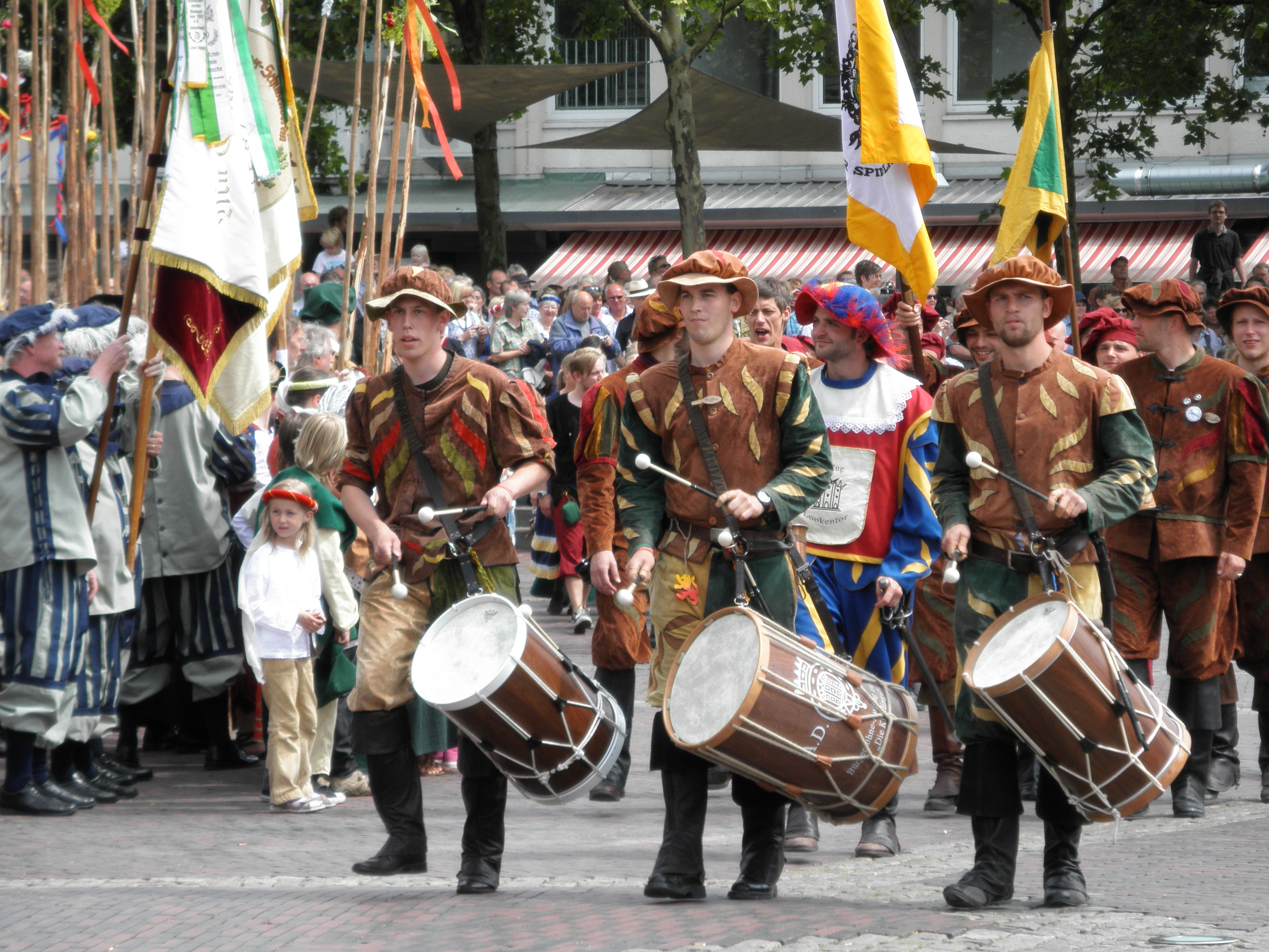 tamburistoj "Kivelinge" en la mezepoka Kivelingsfest 2011 en Lingen (Ems)